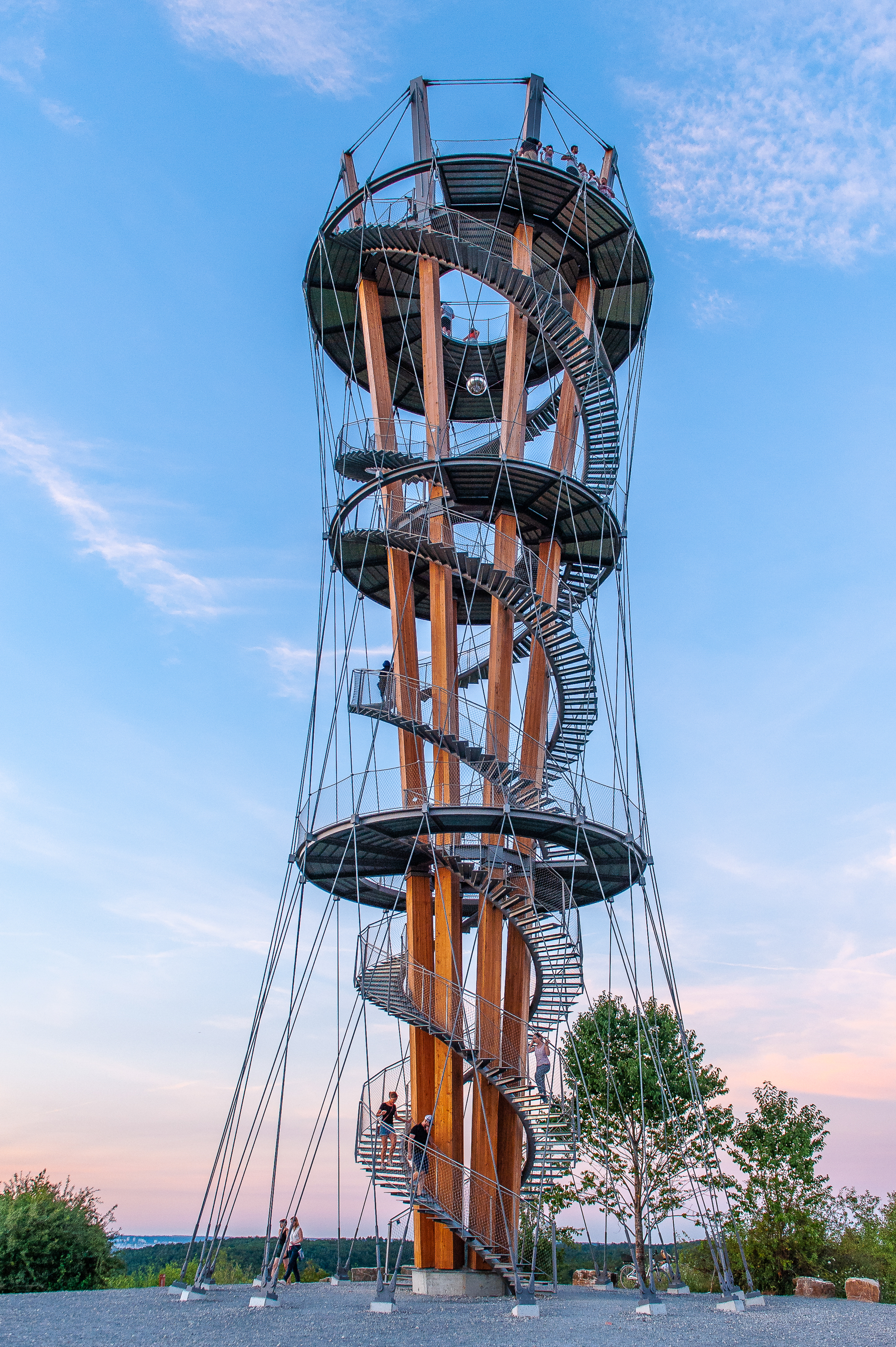 Schönbuchturm